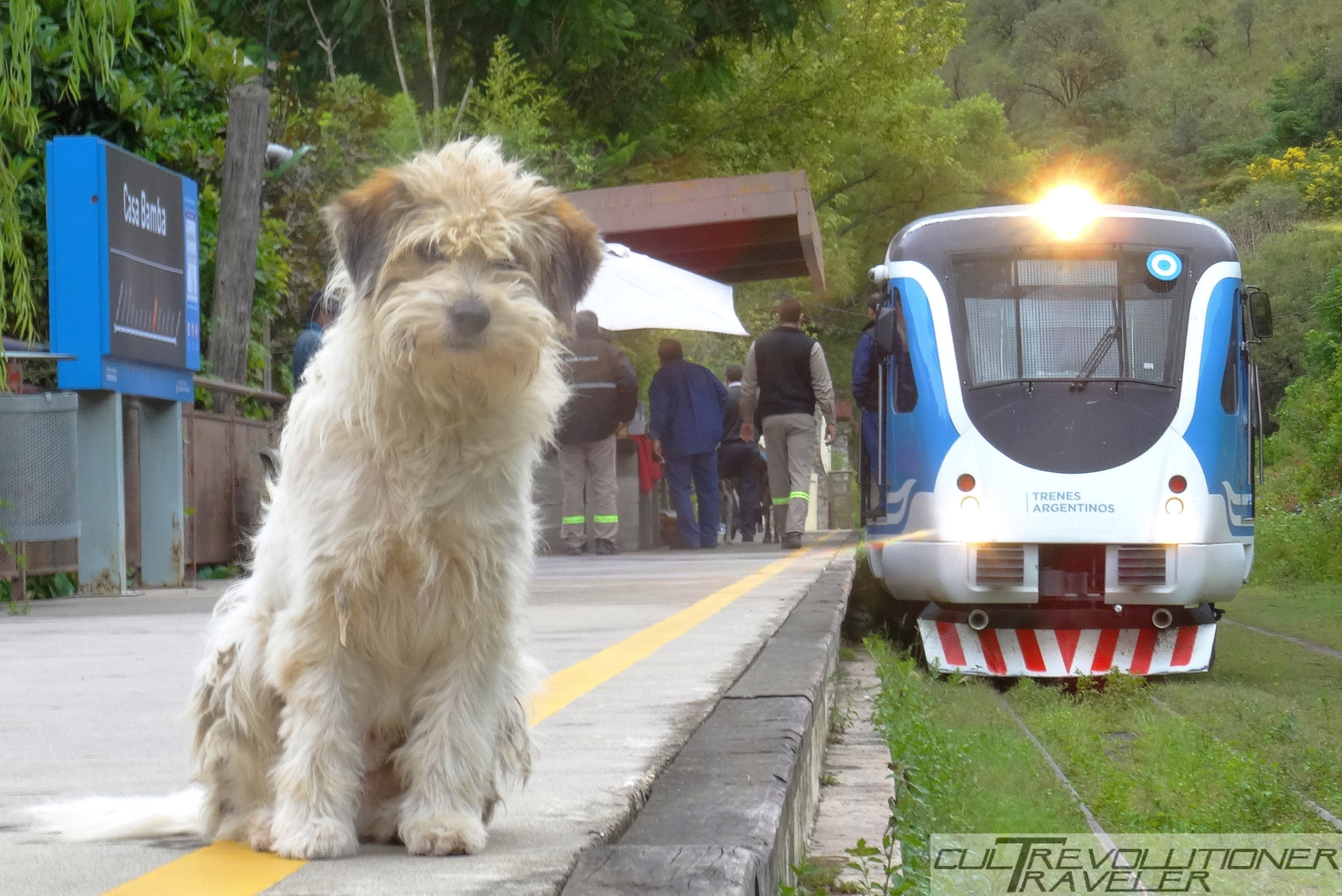 perrito curioso en la estacion Casa Bamba